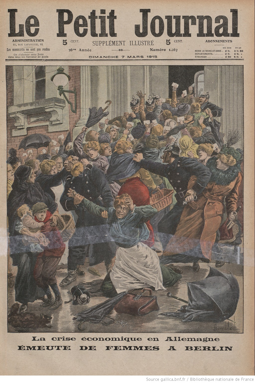 Le Petit journal 7 3 15 Crise économique à Berlin